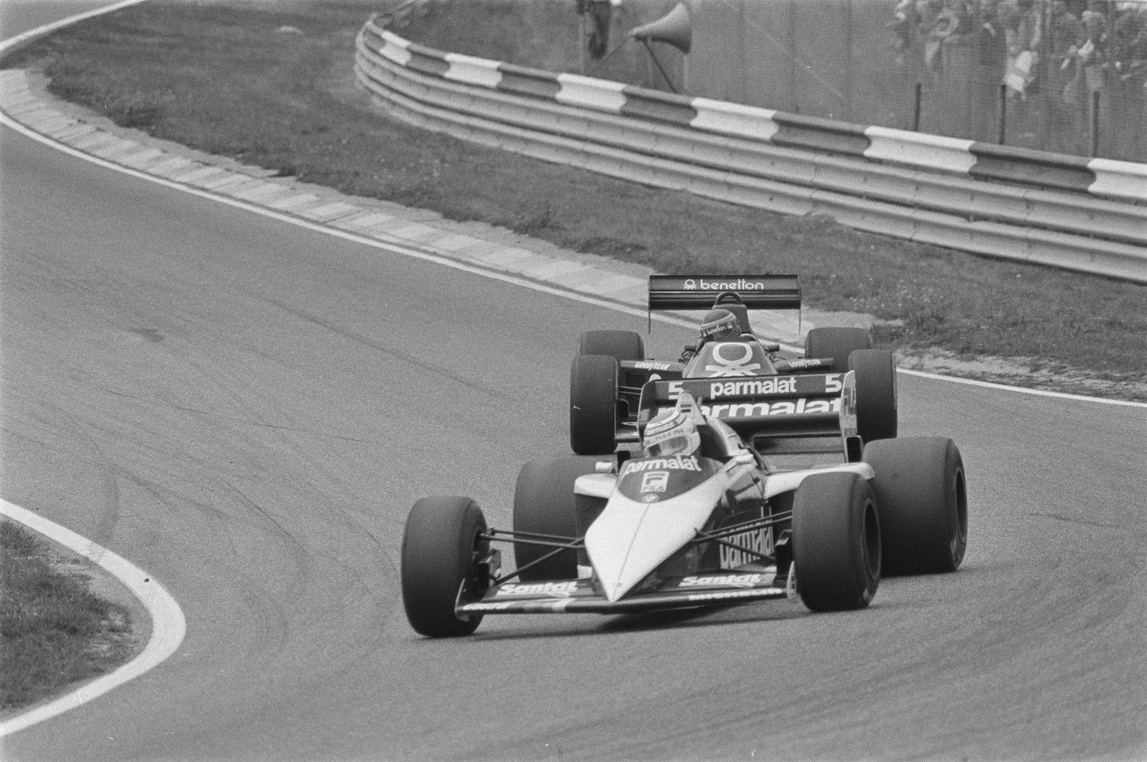 Piquet van het Brabhamteam achter Prost voor Renault in actie.